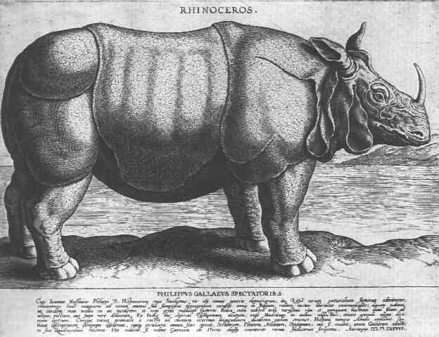 Rhinocéros. Gravure de 1584 par Philipp Galle.